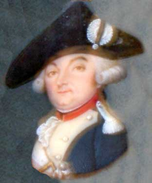 D'après un portrait retrouvé dans les réserves du musée de Chateauroux